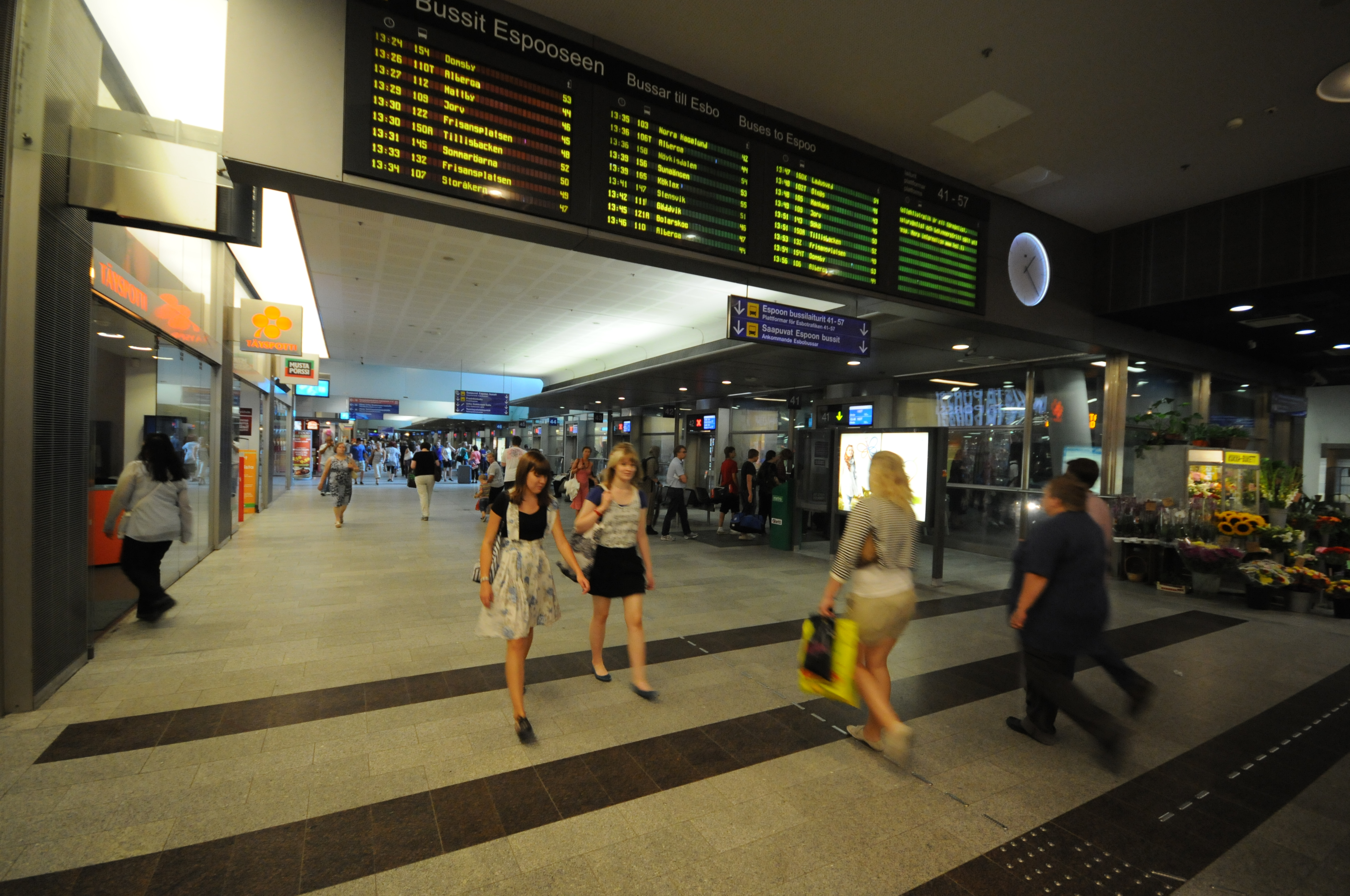 Helsinki